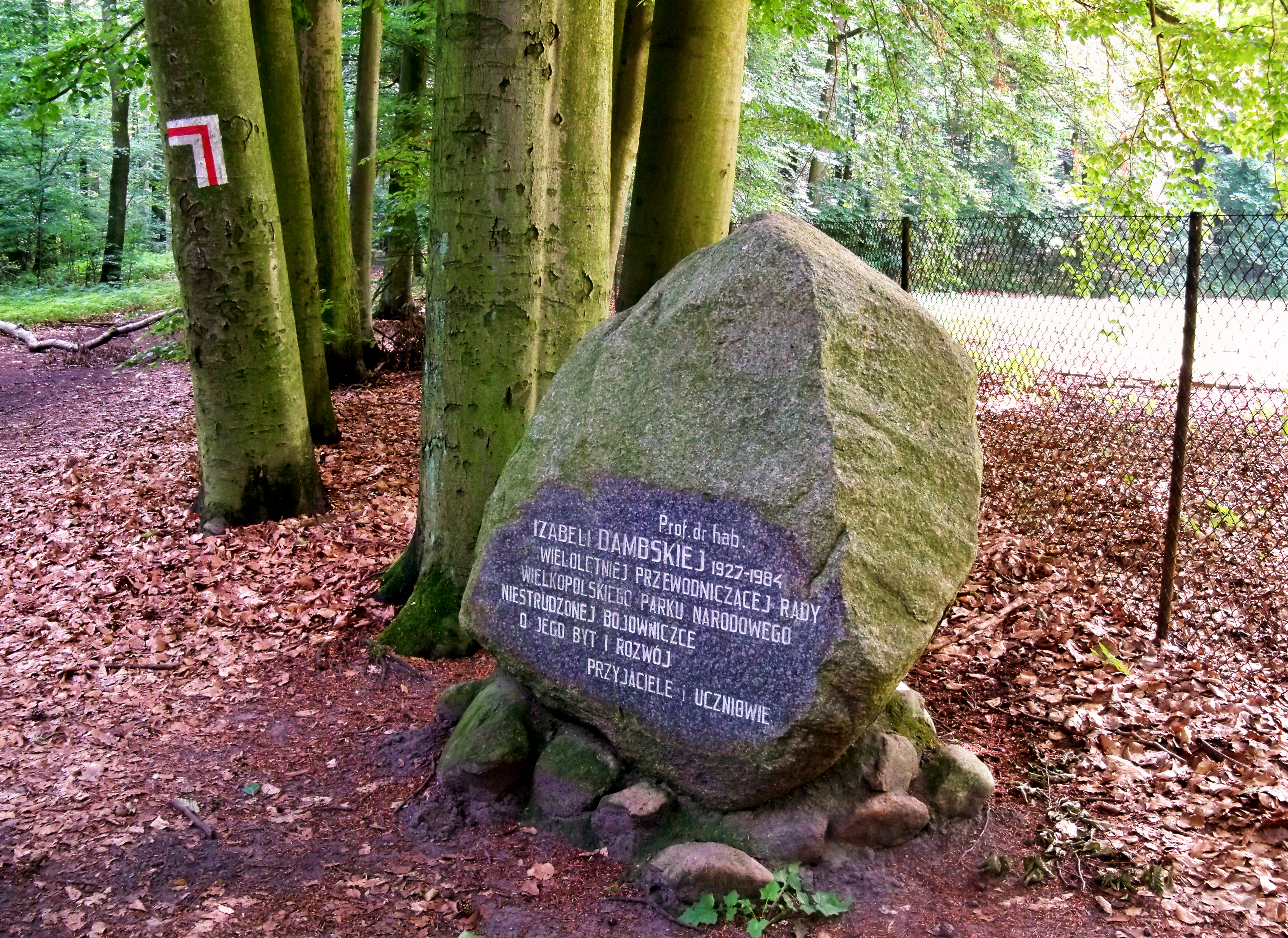 Stacja Ekologiczna UAM w Jeziorach. Głaz narzutowy upamiętniający prof. Izabelę Dąmbską przed wjazdem do stacji (czerwony szlak turystyczny).